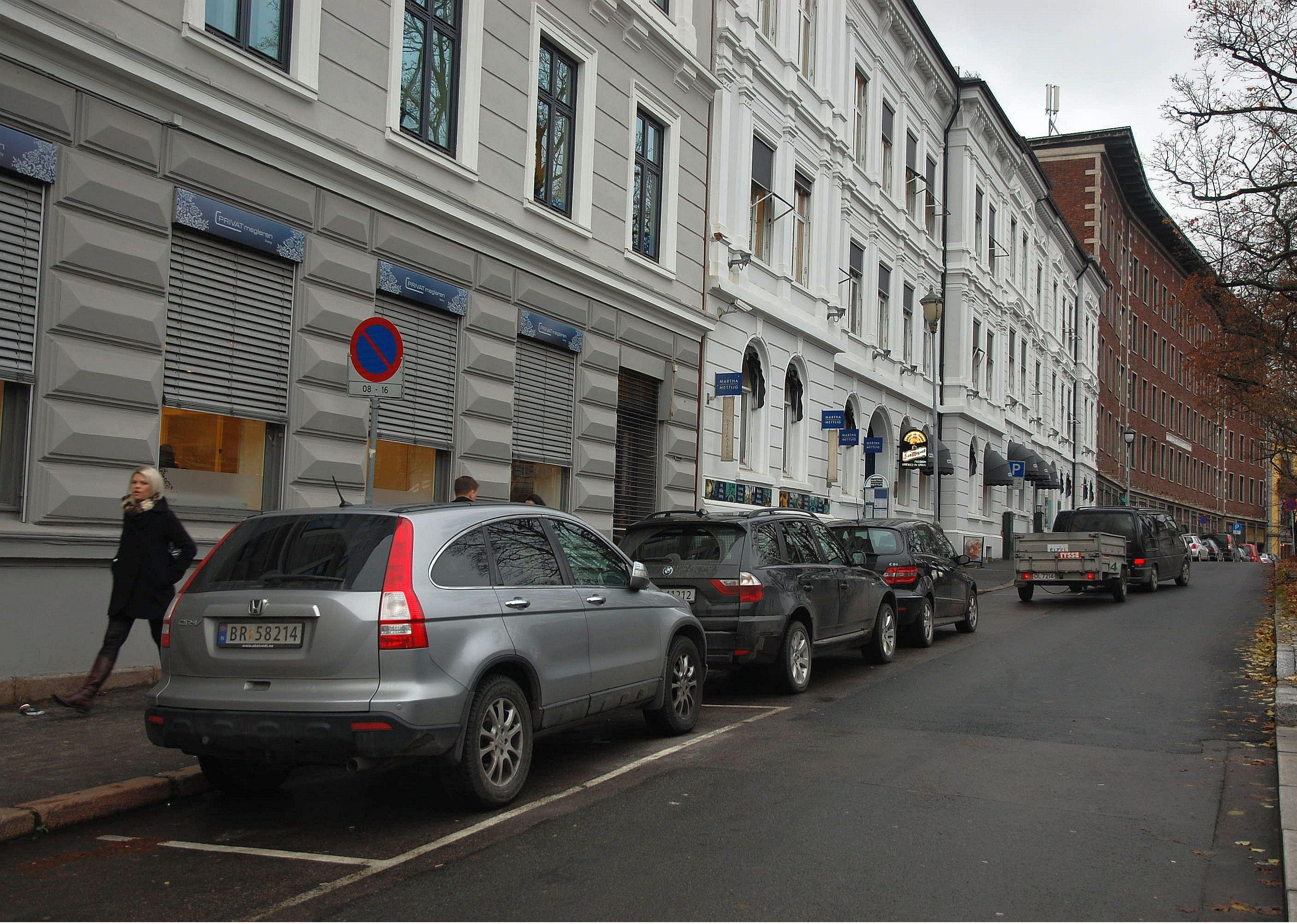 Sommerrogata på Frogner i Oslo